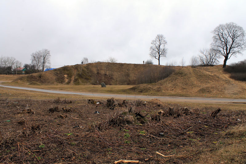 Краснае. Гарадзішча